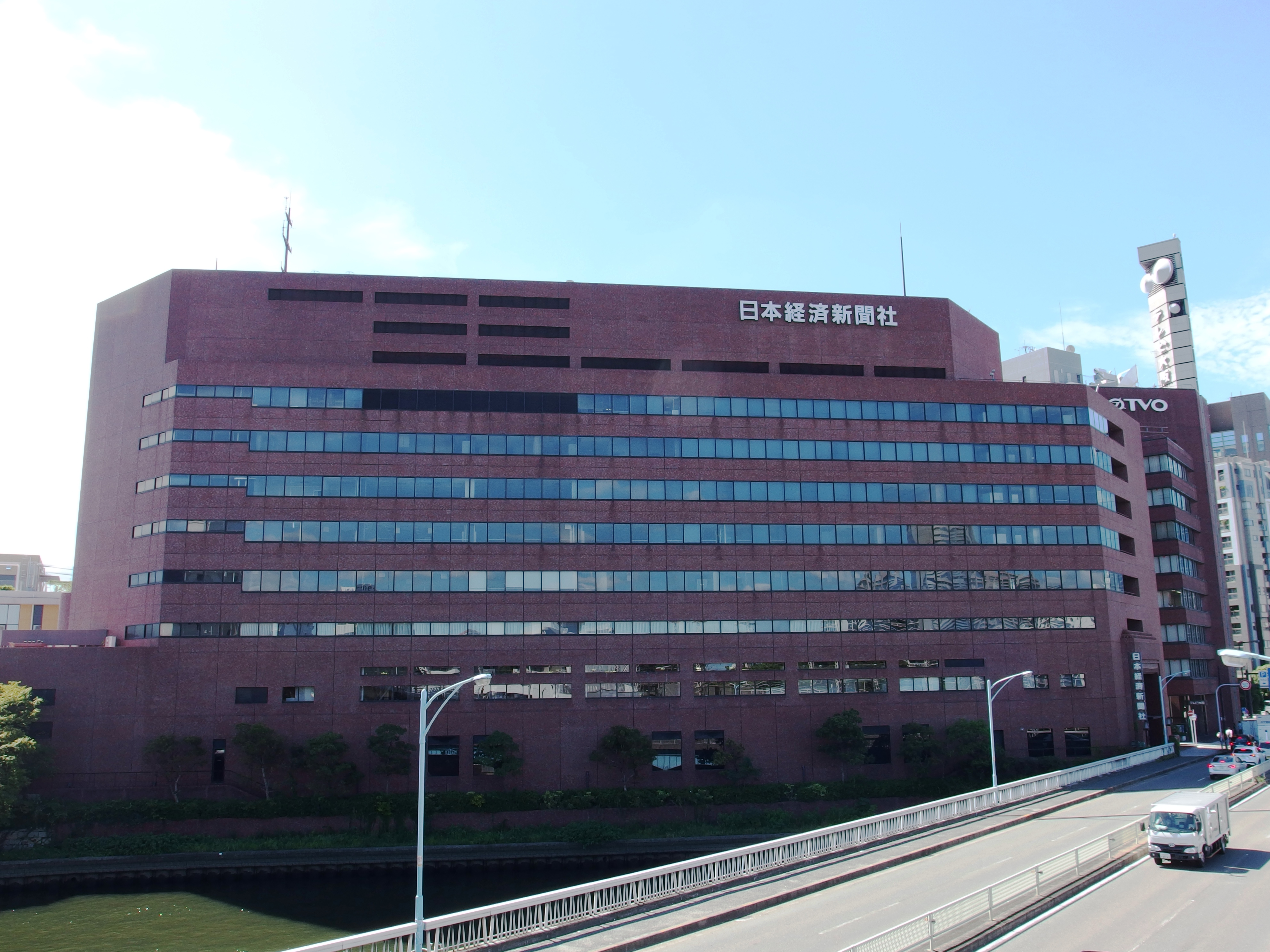 大阪市にある日本経済新聞大阪本社が入居する日本経済新聞大阪本社ビル。